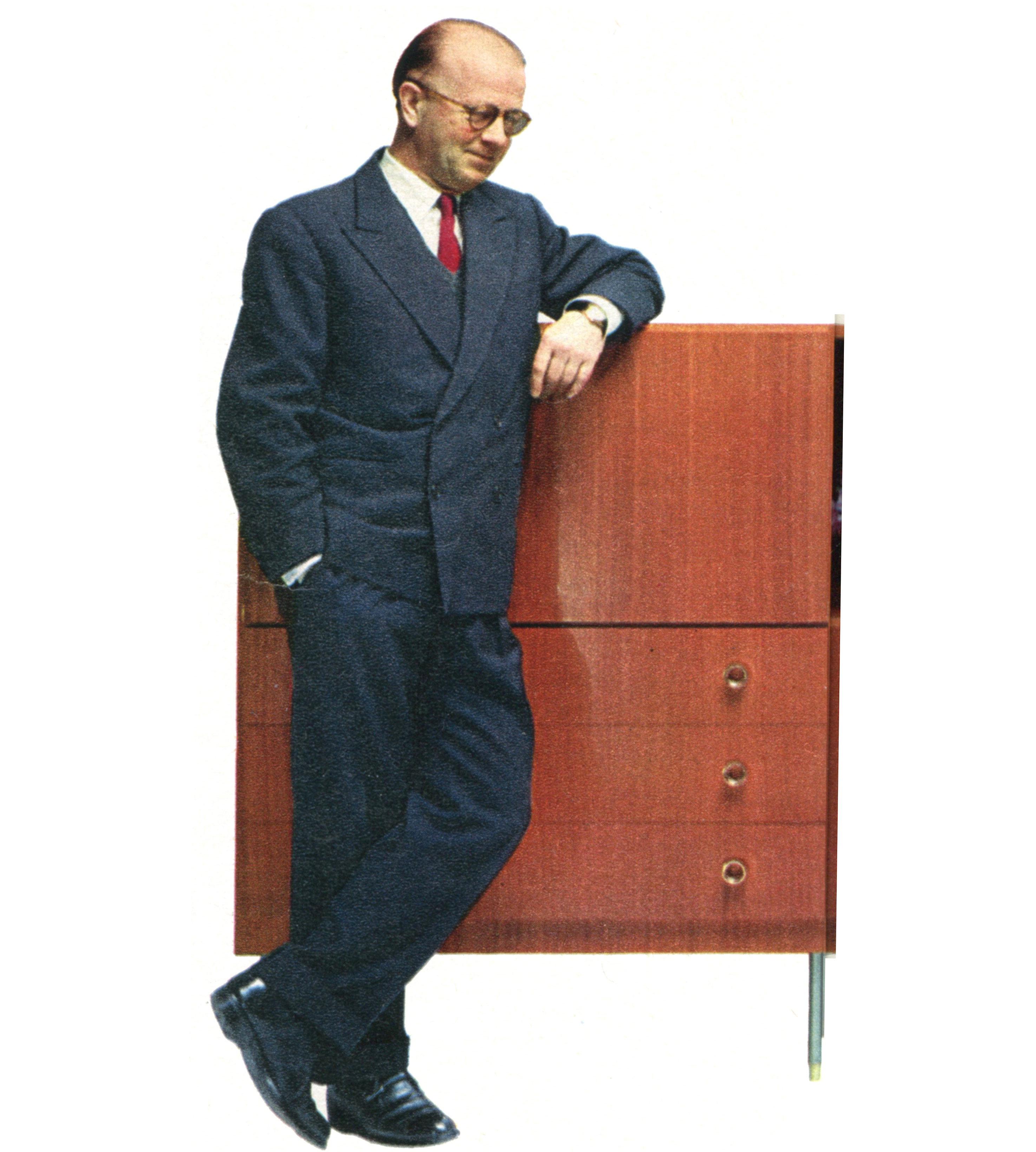 Marcel Gascoin portrait 1962